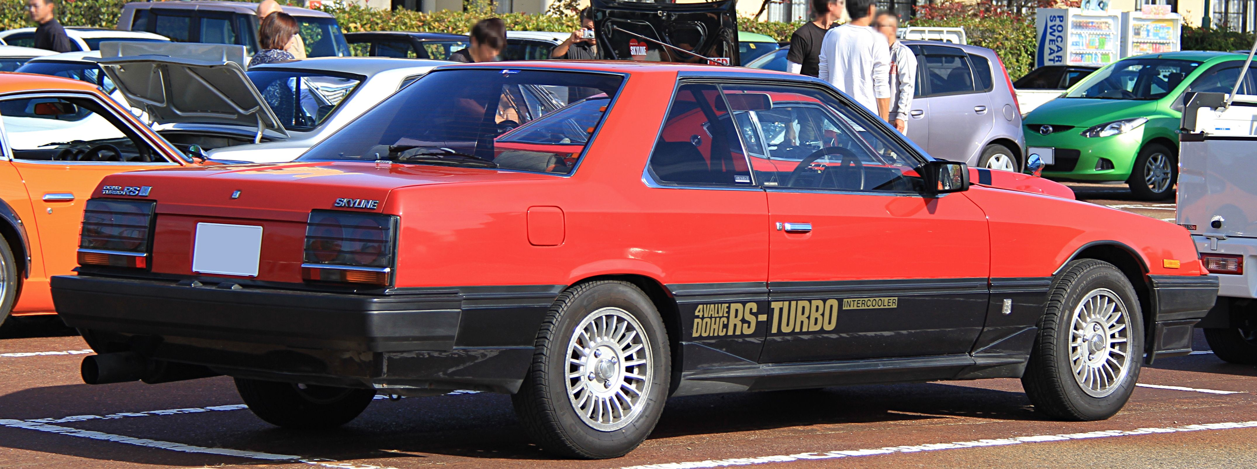 Nissan Skyline